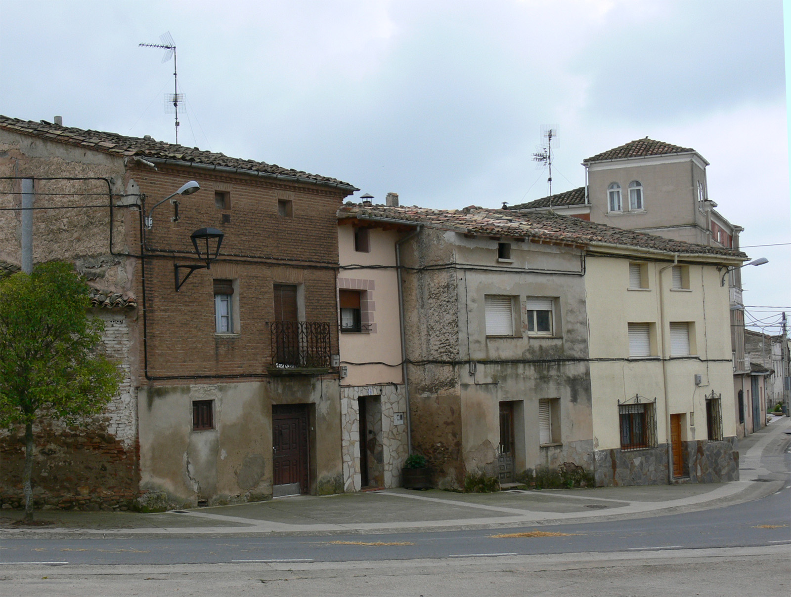 Hervías, La Rioja - España.